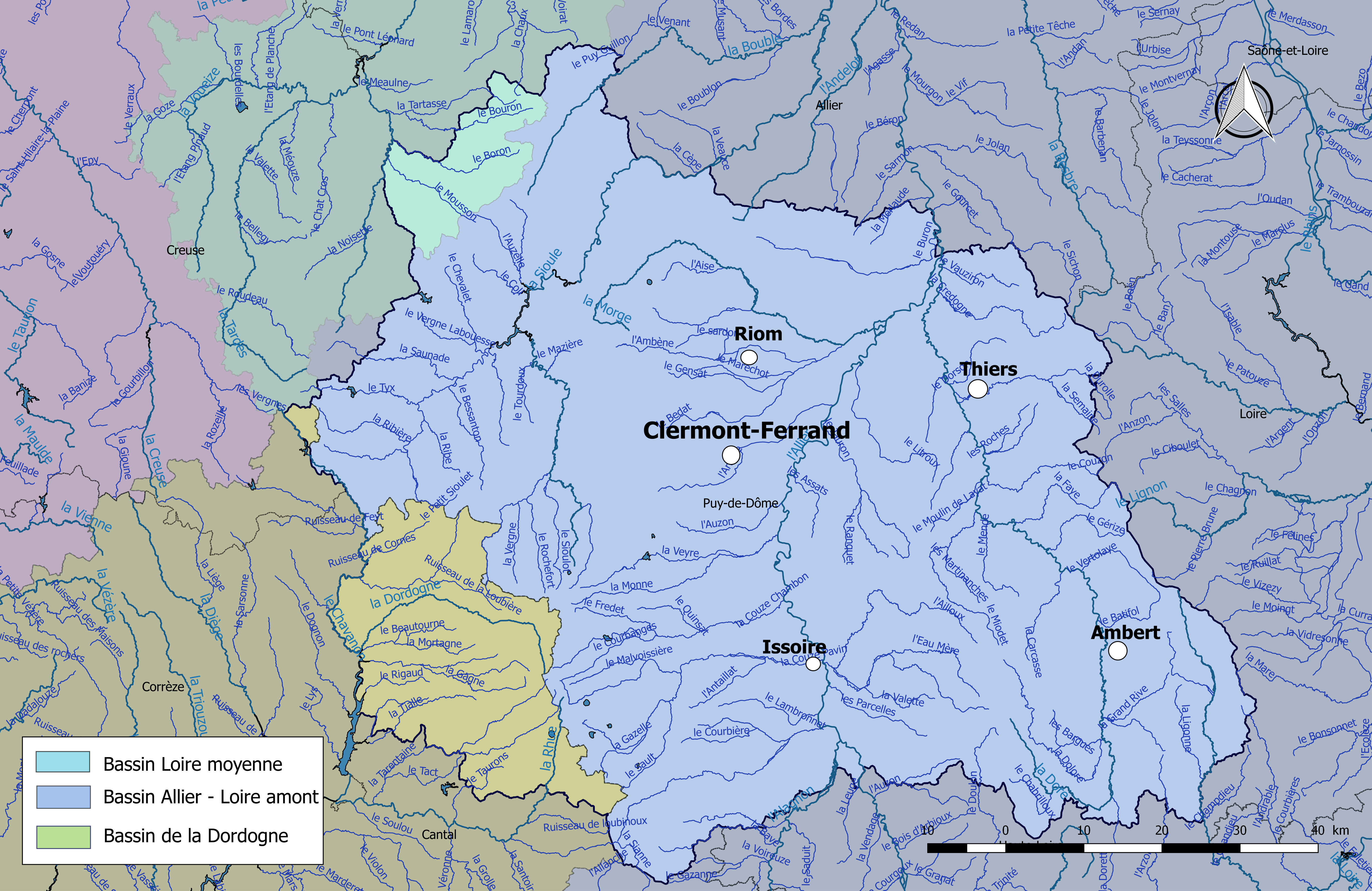 Carte des cours d'eau de longueur supérieure à 10 km et des bassins hydrographiques dans le département du Puy-de-Dôme (France).